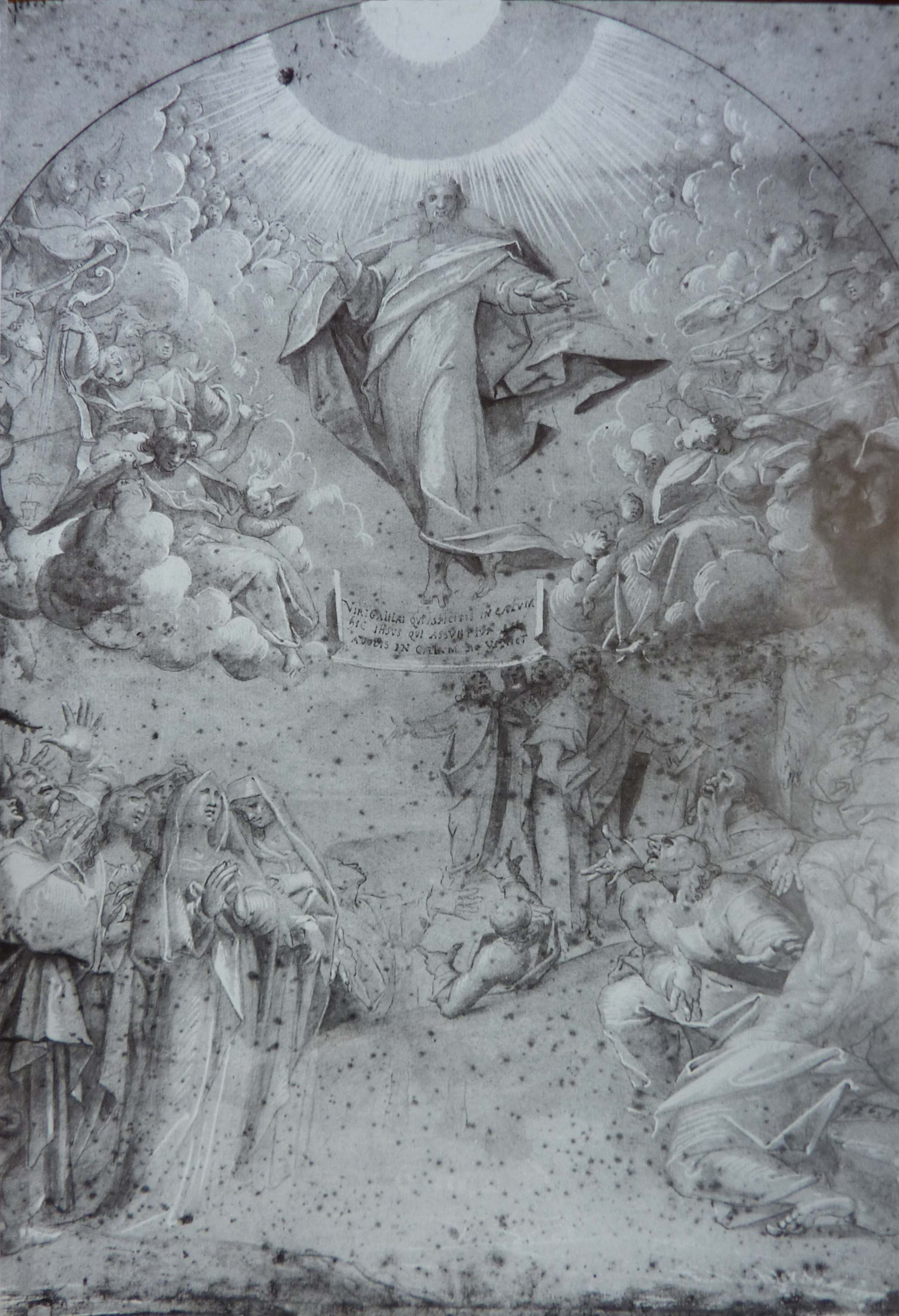 Ascension du Christ par Fernão Gomes, dessin préparatoire, 1599.